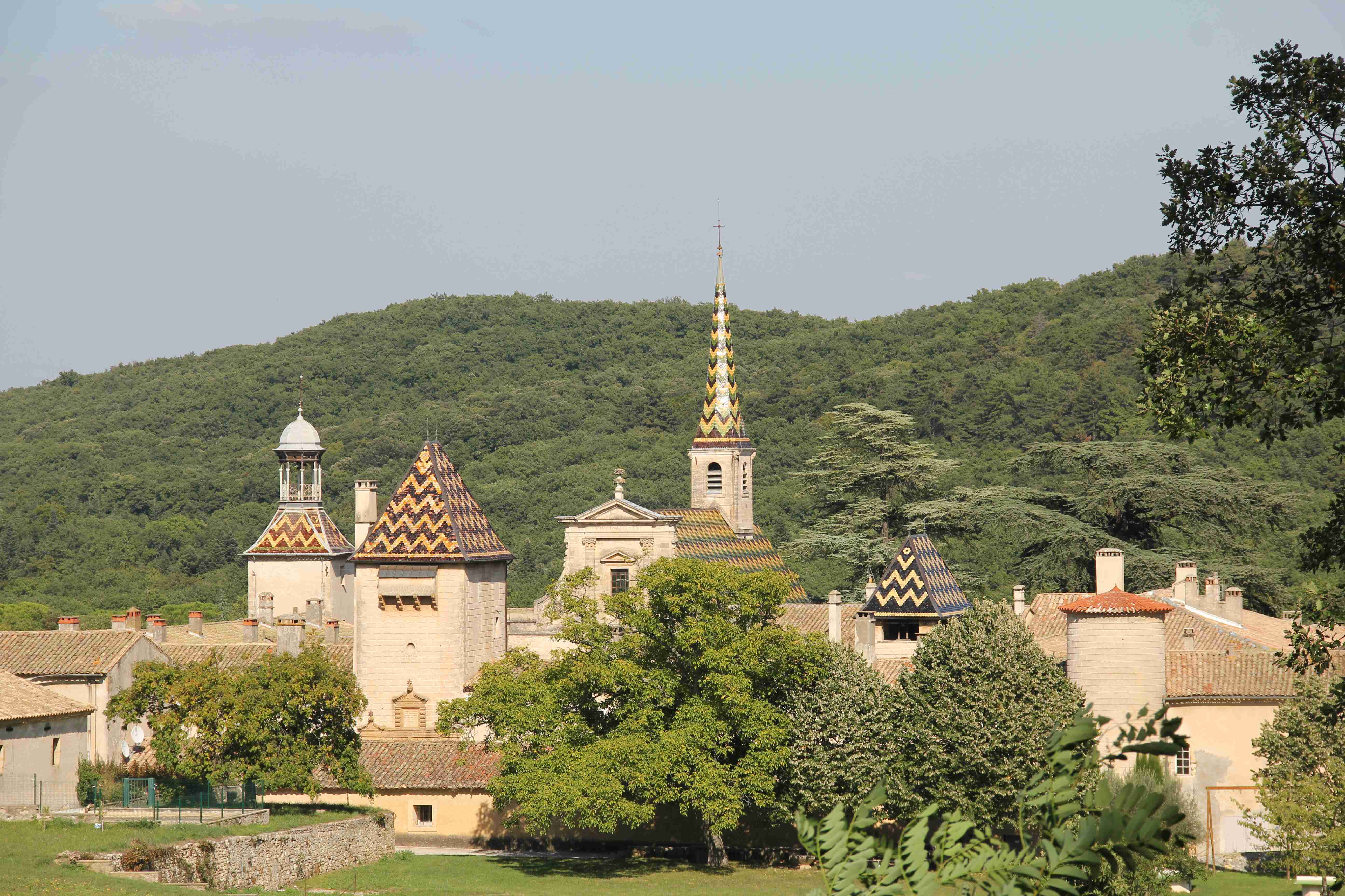 La Chartreuse de Valbonne dans le diocèse d’Uzès doit son origine à Guillaume de Vénéjan évêque d’Uzès, qui changea au commencement de l’an 1204 l’église d’Ornols contre celle de Bondillons dans son diocèse, avec l’abbé d’Aniane et le prieur du monastère de Goudargues dépendant de cette abbaye, pour la donner aux chartreux, qui y établirent une maison de leur ordre, et lui imposèrent le nom de Valbonne.